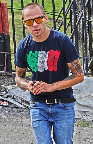 Dawid Lampart (fot.Mateusz Biskup)